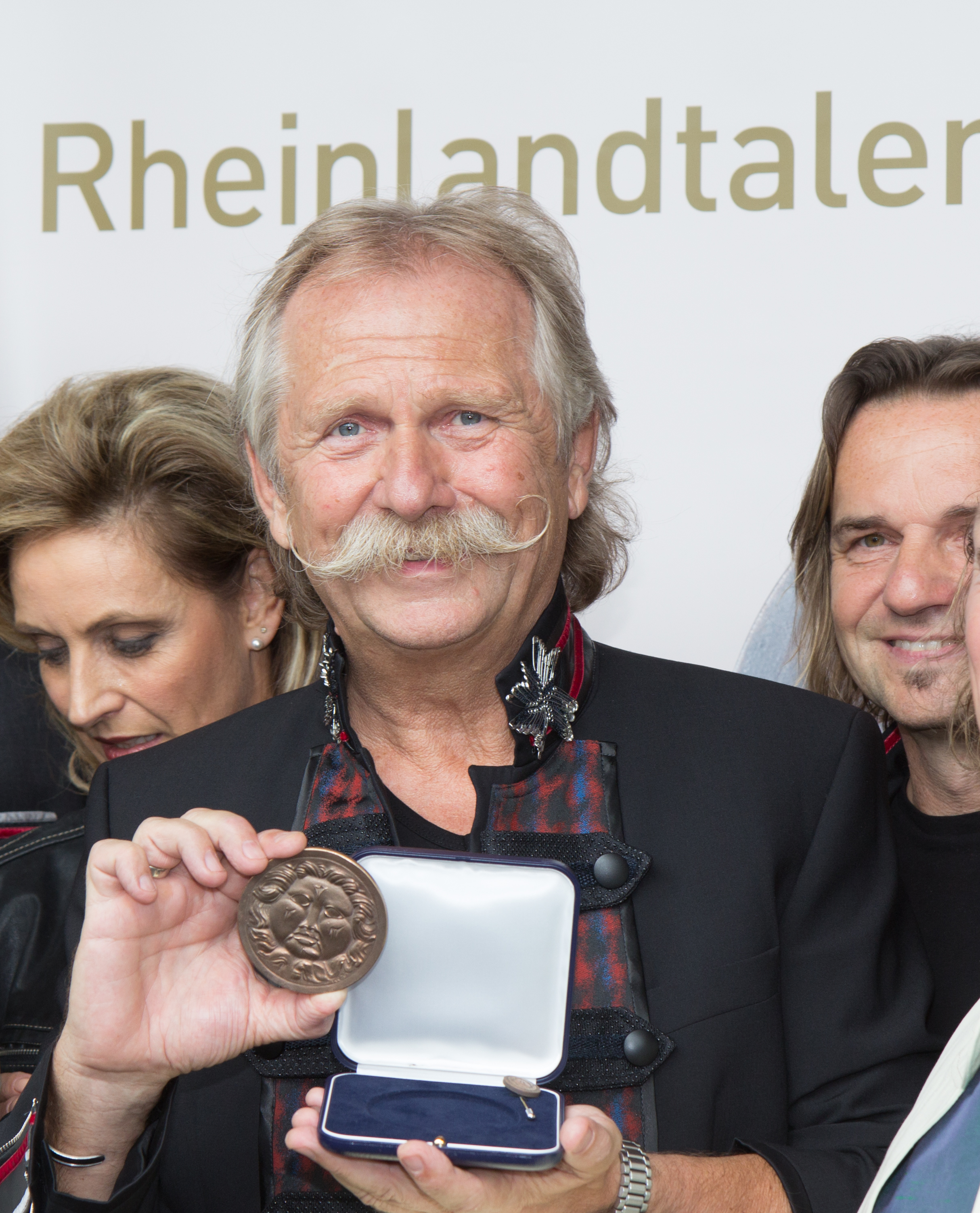 Verleihung des Rheinlandtalers des LVR an die Höhner. Henning Krautmacher mit dem Taler.